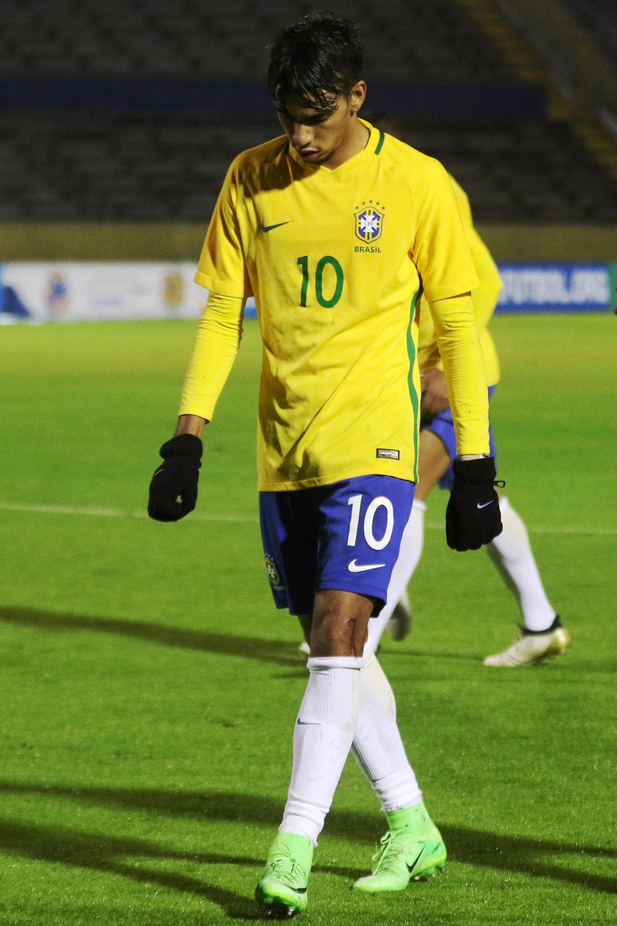 Quito, 2 de febrero del 2017 (Andes).- La selección uruguaya Sub 20 derrotó 2-1 este jueves a Brasil en el estadio Olímpico Atahualpa de Quito ante unas 3.000 personas, con lo que sumó seis puntos y se puso a tiro de la clasificación al Mundial Corea del Sur 2017. ANDES/Micaela Ayala V.